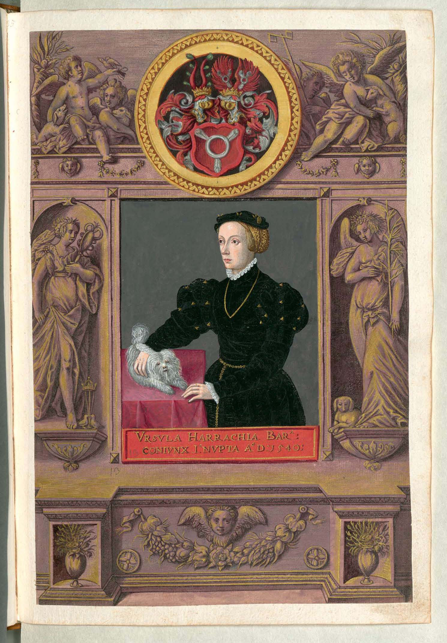 Fuggerorum et Fuggerarum imagines wurde 1588 von Philipp Eduard Fugger beim Kupferstecher Dominicus Custos in Auftrag gegeben. Das Werk enthält mit Aquarell- und Gouache-Farbe kolorierte Stiche der Mitglieder der Fugger von der Lilie. Der Druck von 1618 stellt das einzige kolorierte Exemplar dar. Ursula von Harrach (1522-1554), erste Ehefrau Johann Jakob Fuggers (1516-1575)